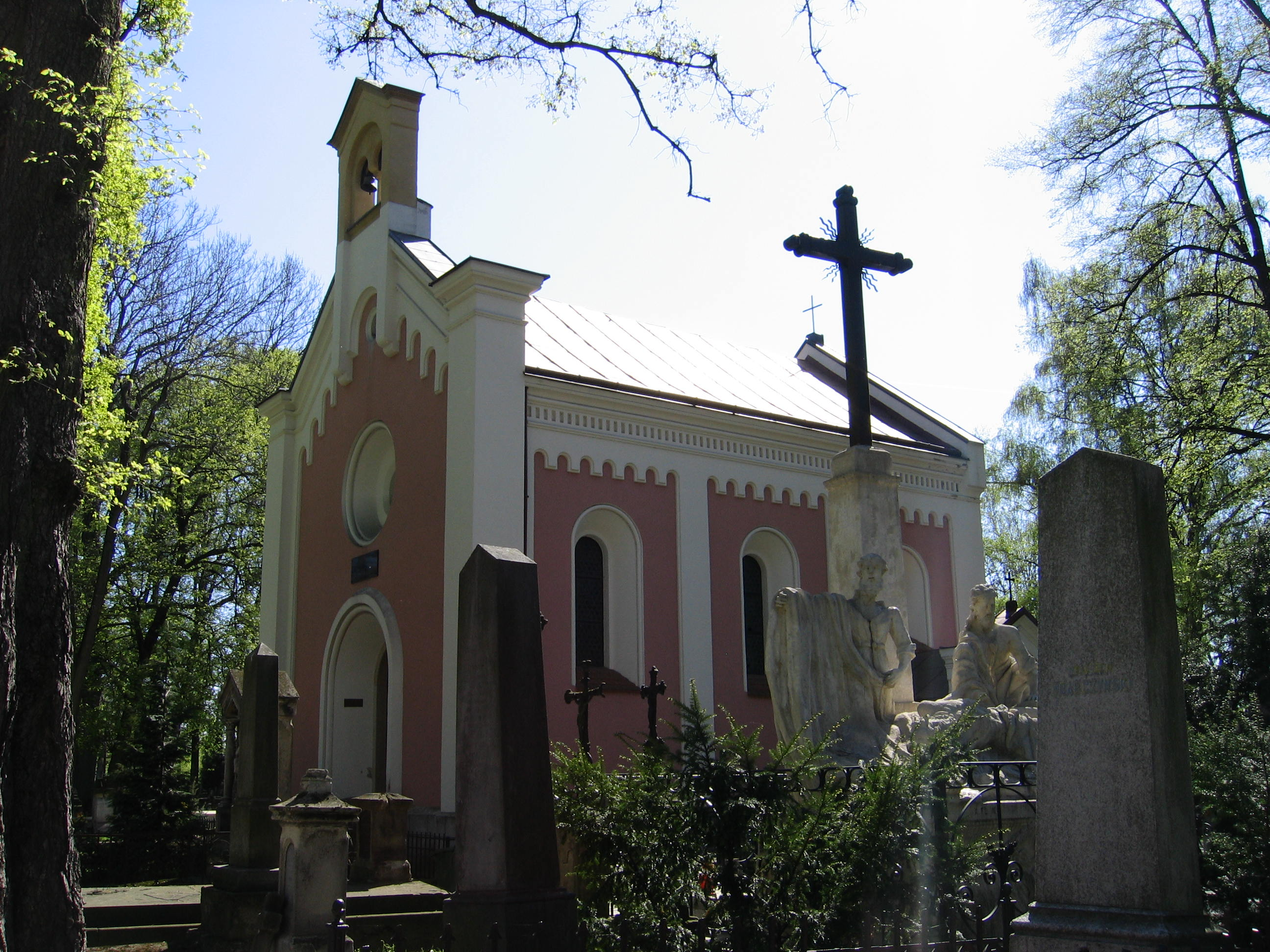 Tarnów - Stary Cmentarz, kaplica Sanguszków (zabytek nr kl.V-114/15/57 z 30.09.1957; A-127a z 11.06.1977, dec.: A-125 z 18.06.1977)